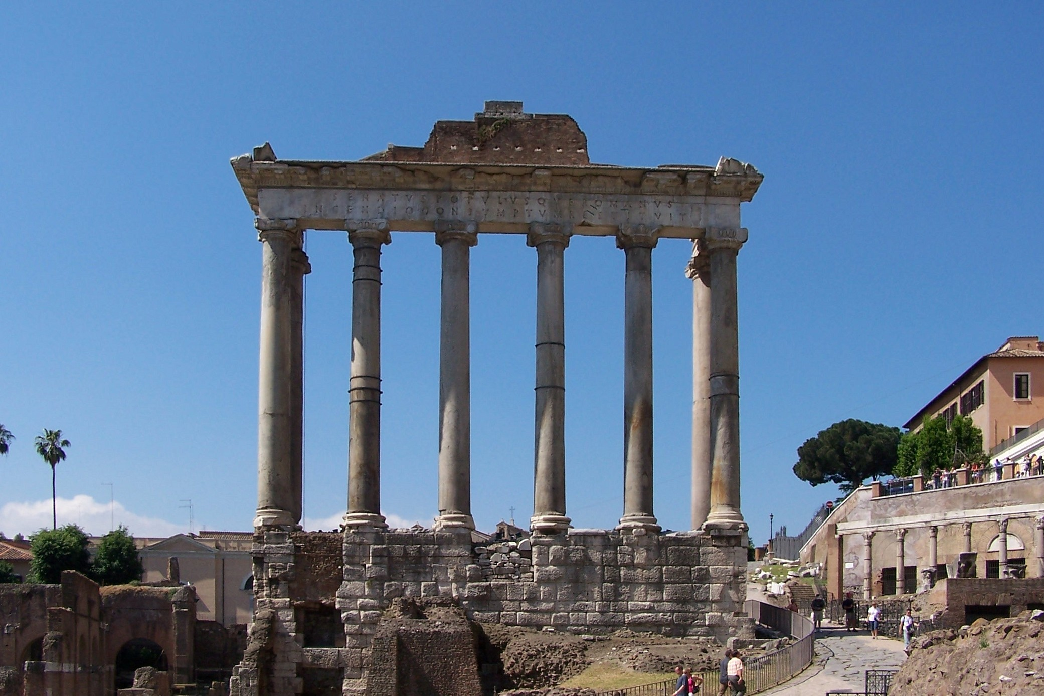 Forum Romanum, die Säulen des Saturntempels